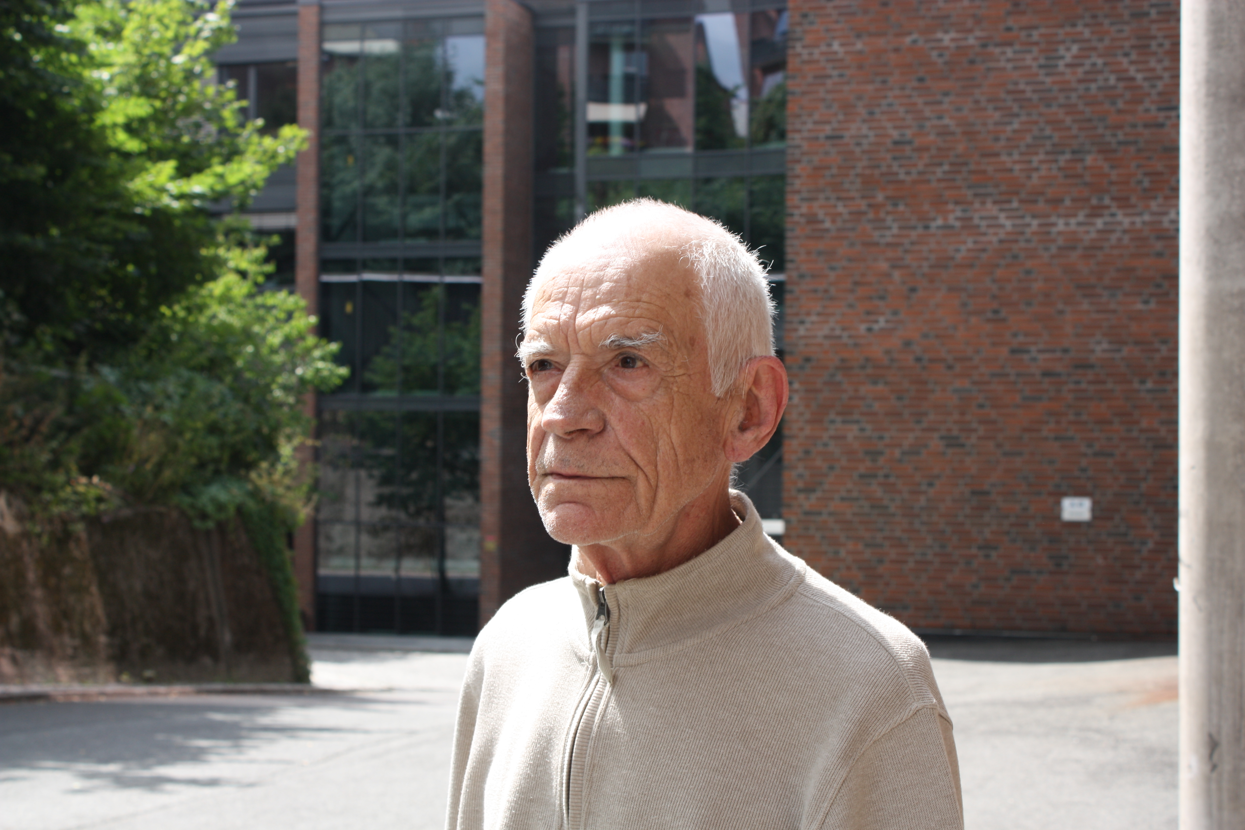 Gary Peacock vor dem Rainbow -Studio in Oslo